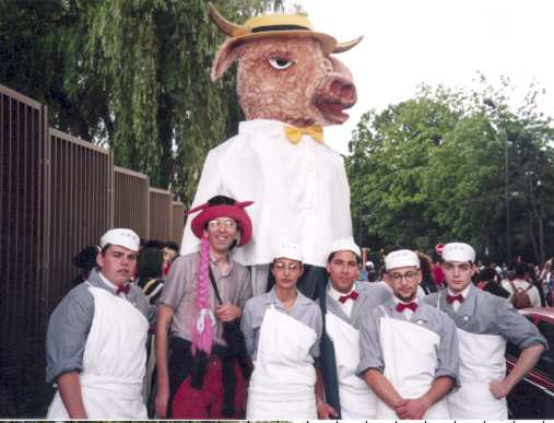 Photo prise au bas de la rue Le Vau, Paris 20ème, à l'occasion de la première sortie du Géant-Bœuf du Carnaval de Paris, pour le cortège du précarnaval du 7 juin 1998. Créé à l'initiative de Basile Pachkoff et Alain Riou, par Rafael Esteve assisté de sa fille Ophélie (la chemise étant l’œuvre de Sofia Djerbi), ce géant a ensuite défilé chaque année au Carnaval de Paris. La première fois le 27 septembre 1998, puis le 26 septembre 1999... et la dernière fois le 22 février 2009. Il a été anéanti accidentellement dans un incendie au mois de juin 2009.